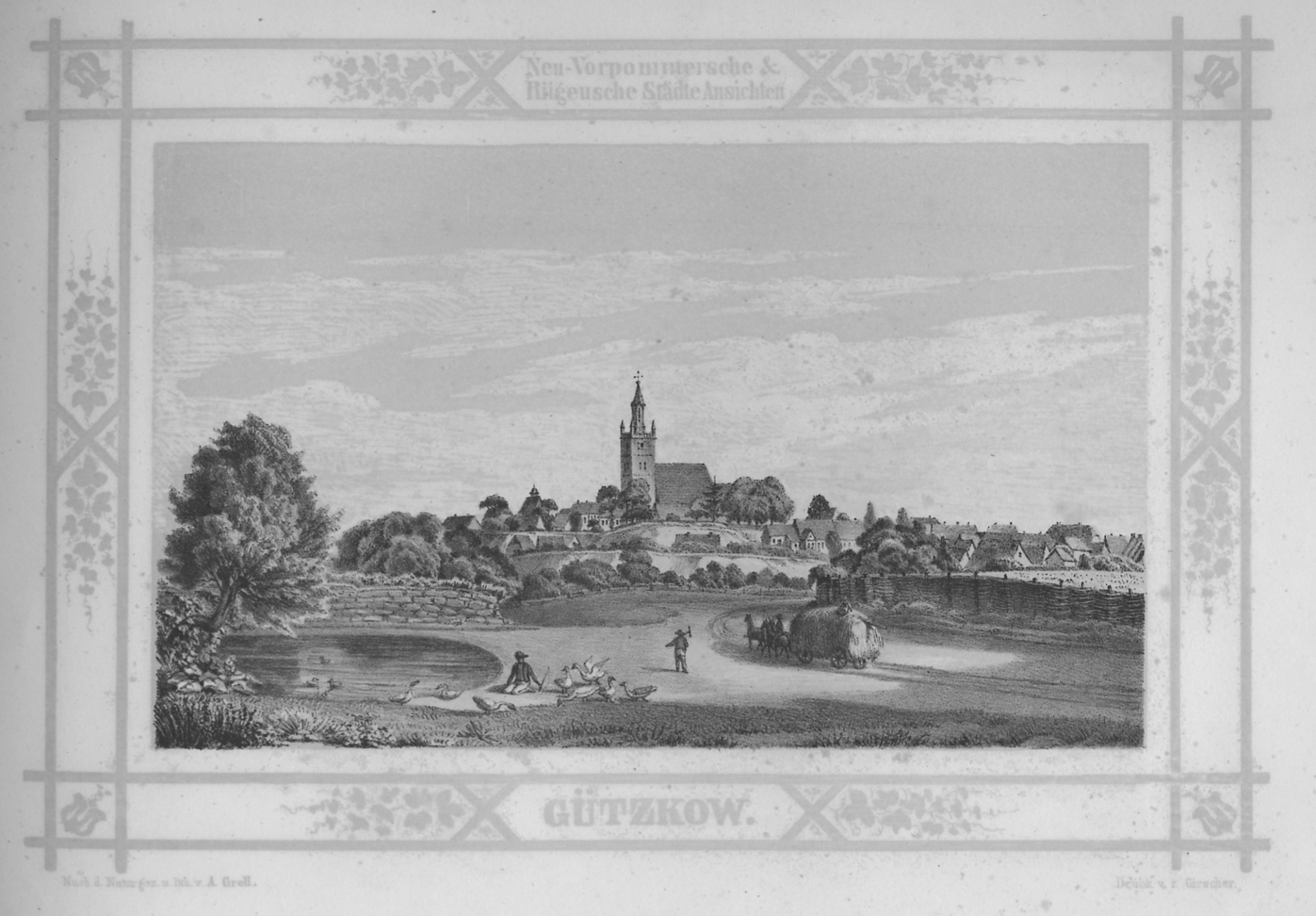 Gützkow in Neuvorpommern um 1845